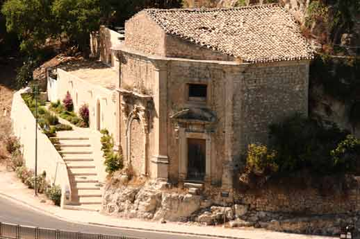 Panoramica - Chiesa S. Maria dei miracoli